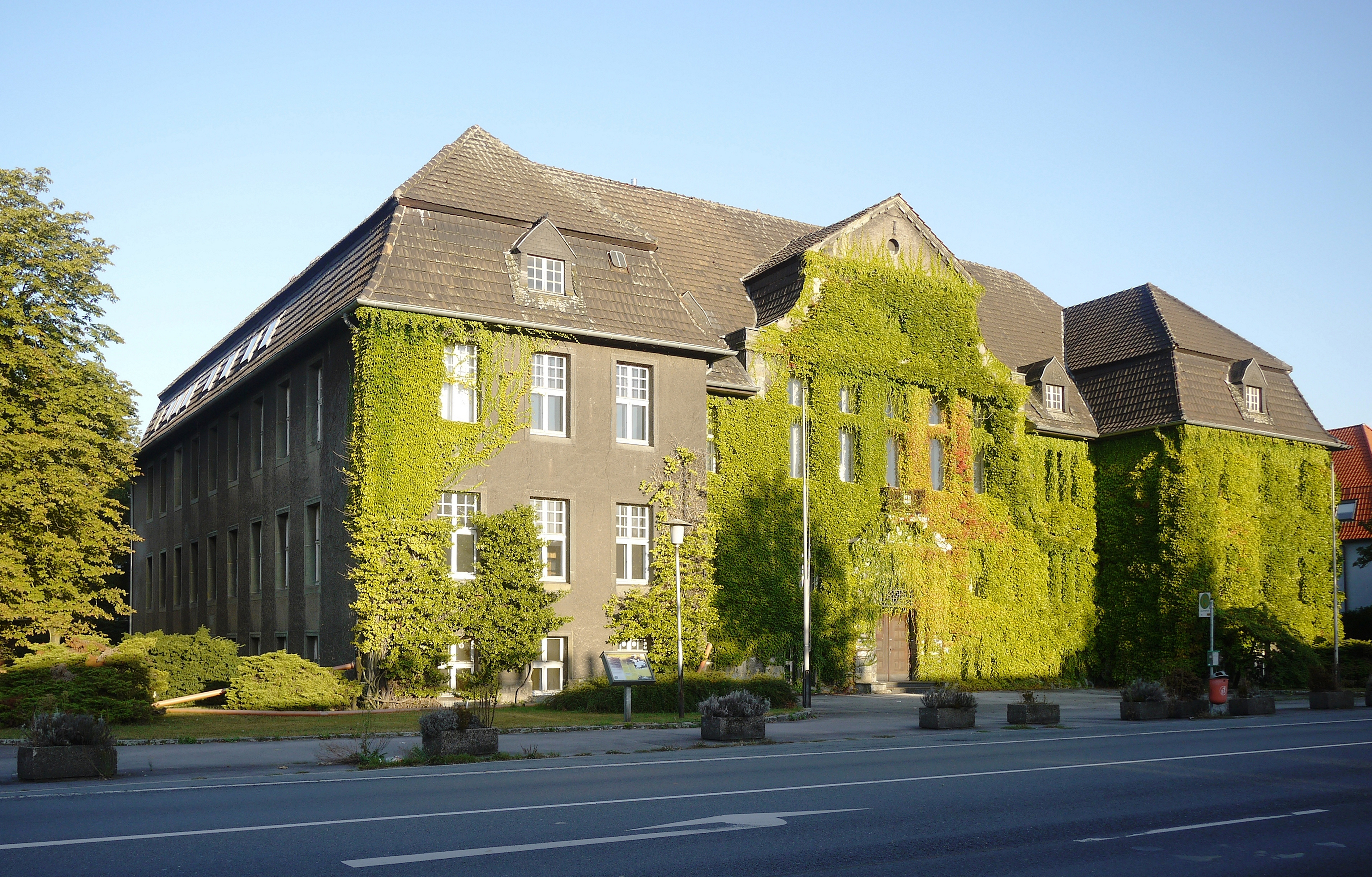 Rathaus der ehemaligen Gemeinde Rheinkamp, seit 1975 zu Moers gehörig, denkmalgeschützt